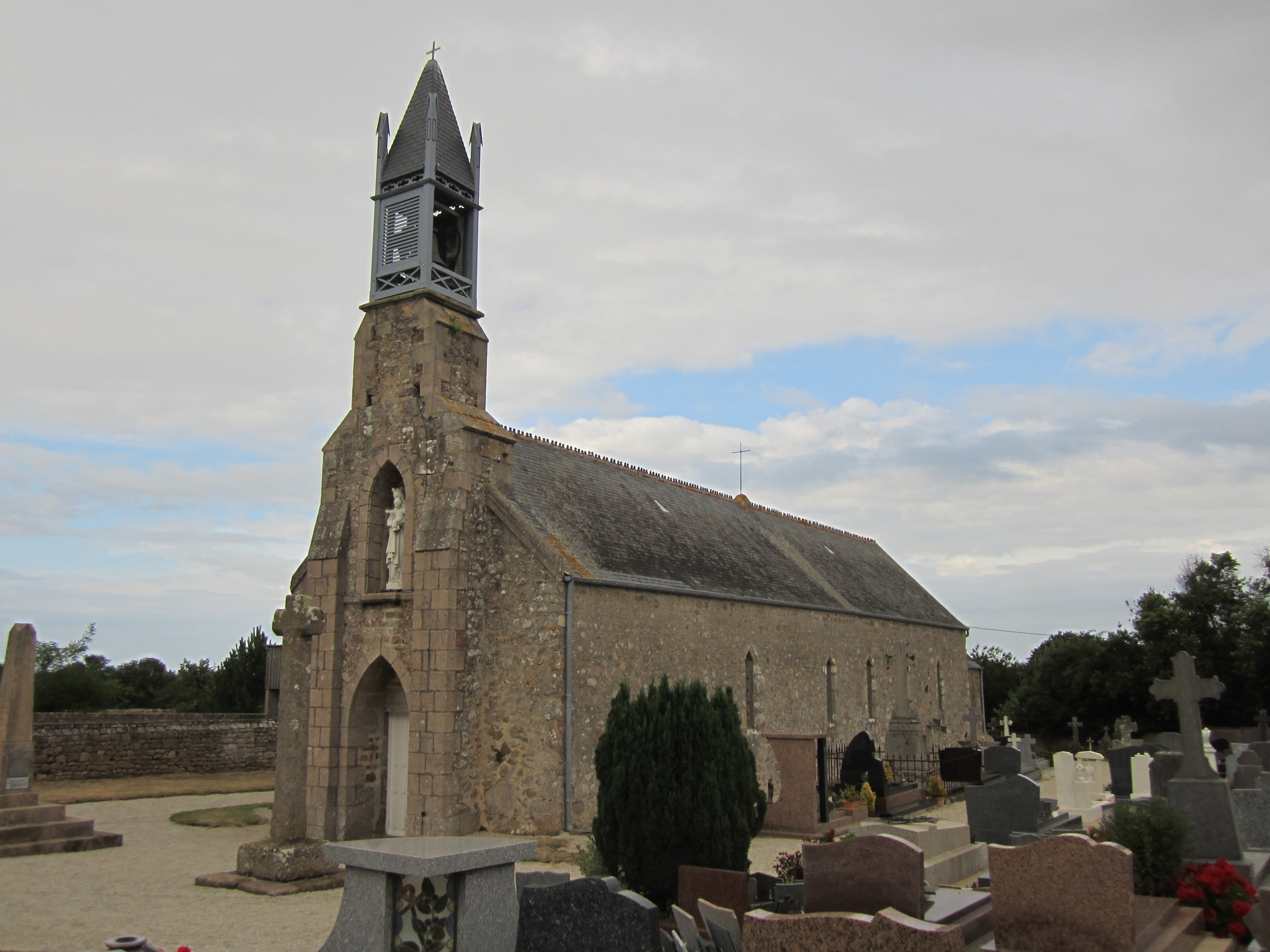 église Saint-Sébastien de Vrasville, Cosqueville, Manche